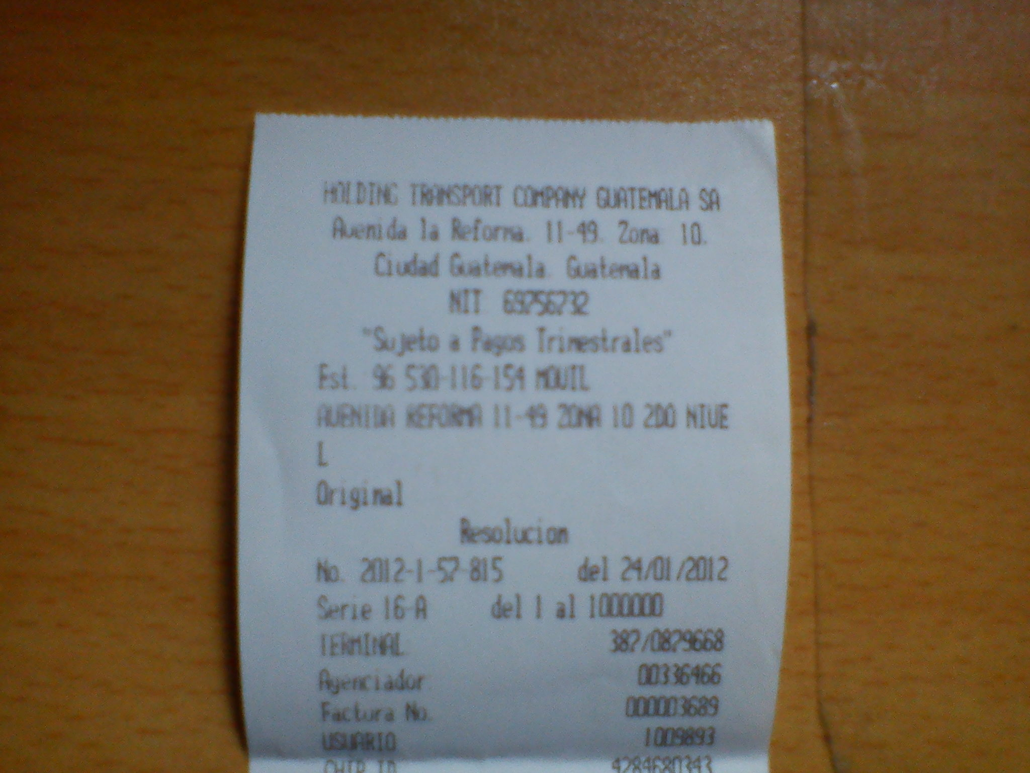 Factura de Holding Trasport Company Guatemala, S.A. Nombre Fiscal del Sistema Integrado de Cobros Electrónicos